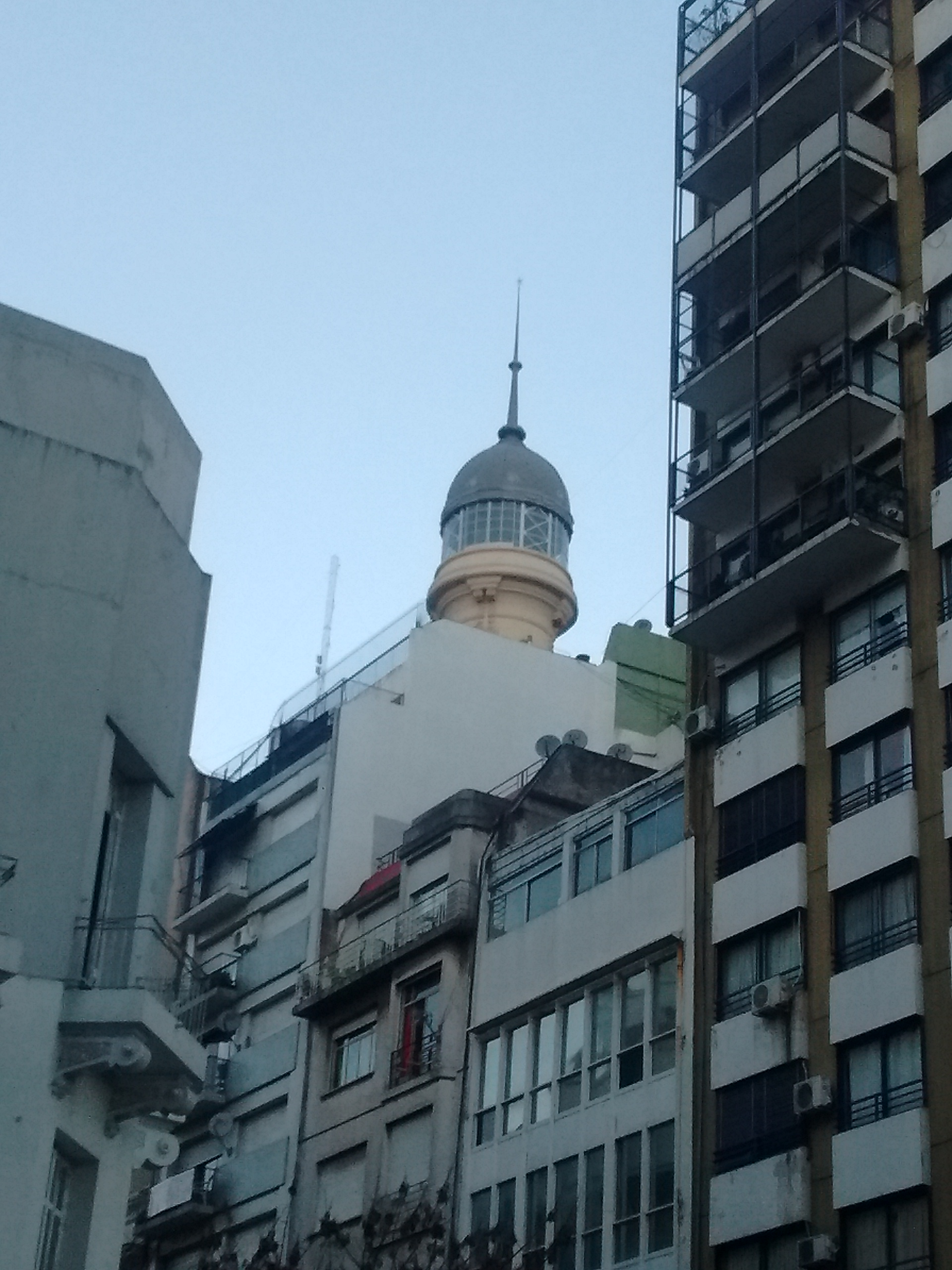 Palacio Dassen, actual Asociación Argentina de Actores, Adolfo Alsina n°s 1762/1764/1766, Buenos Aires, Argentina.